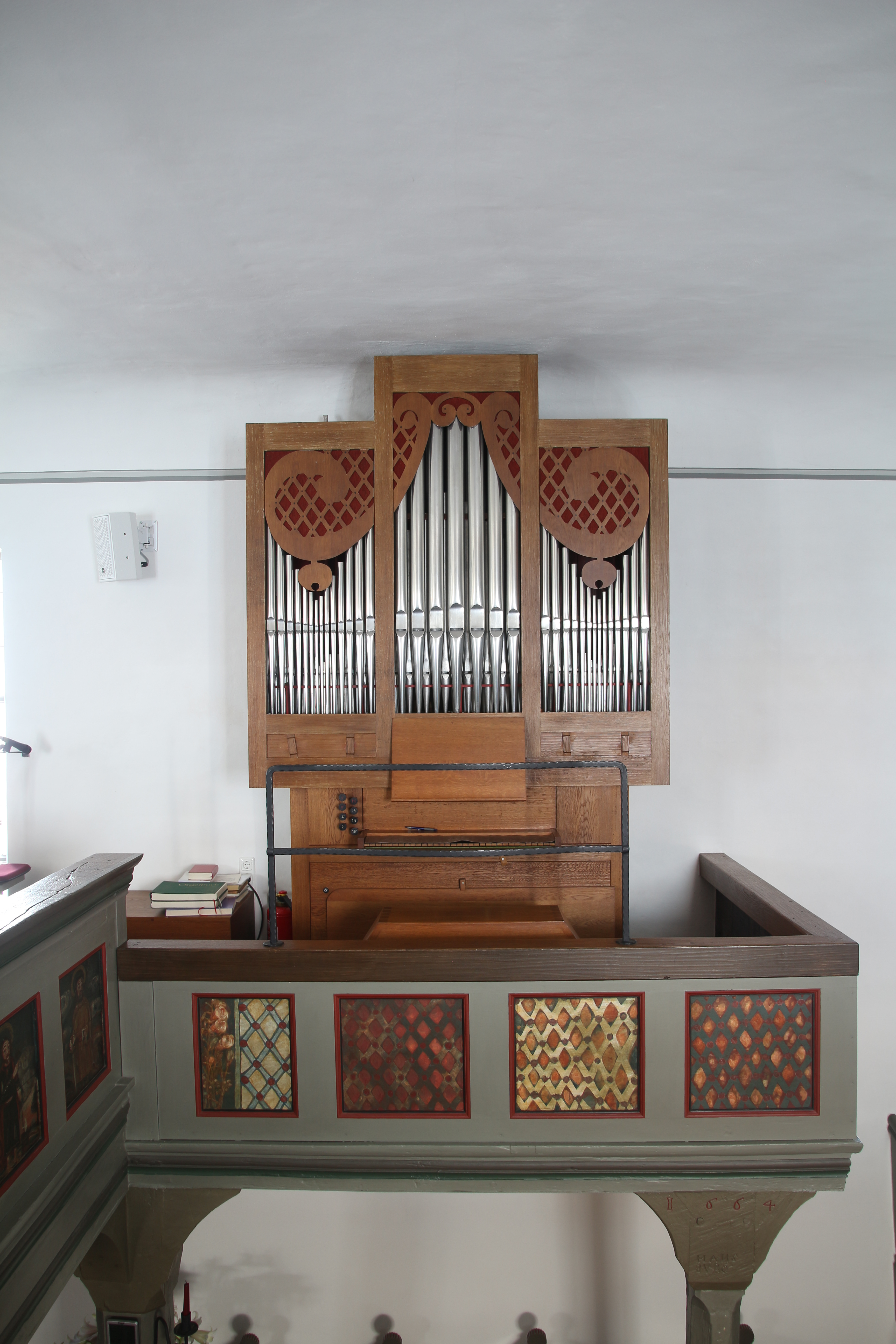 Siehe Bild und Dateiname